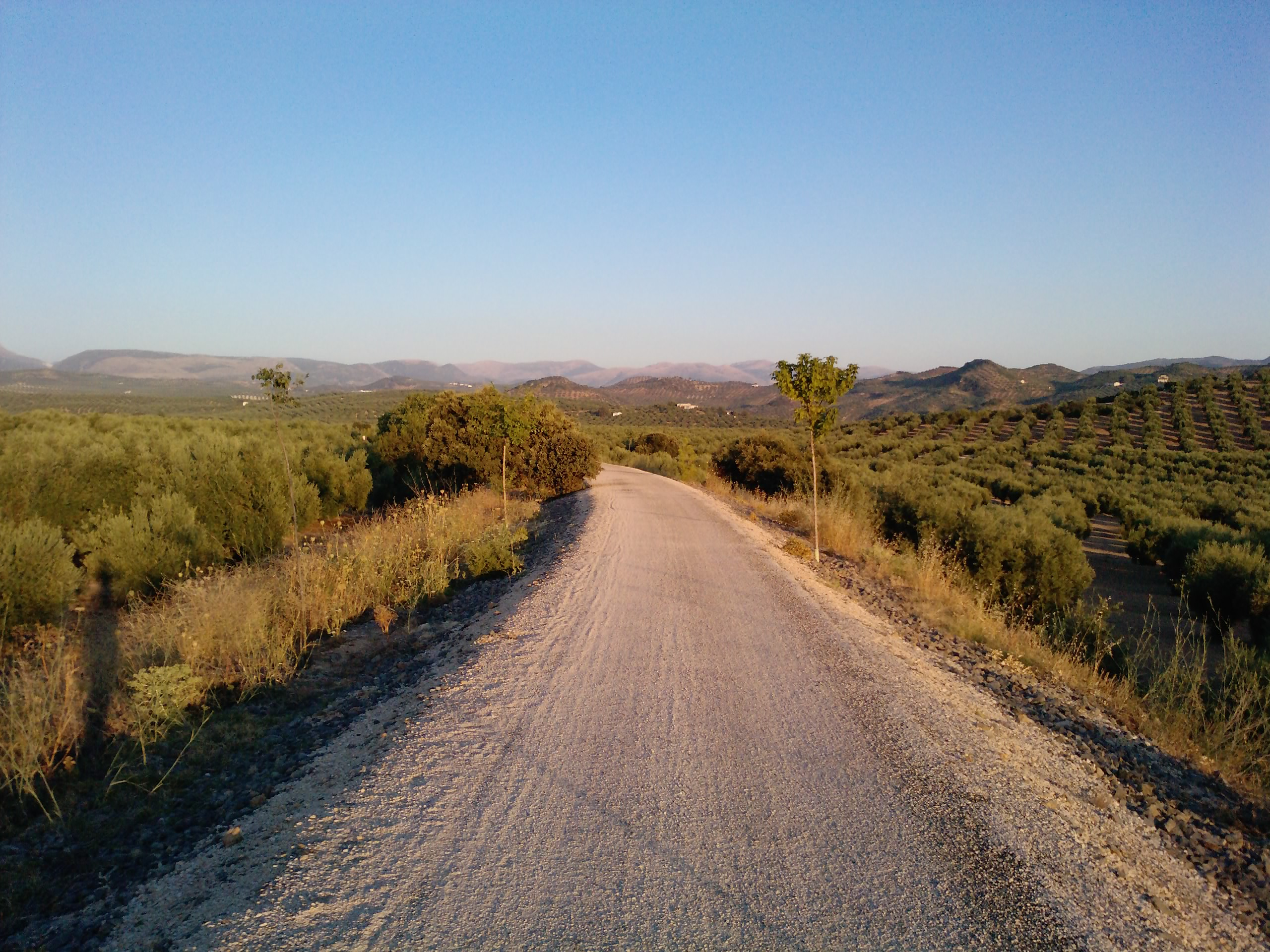 Tramo de la Vía verde del Aceite en el término municipal de Martos (Jaén), España.